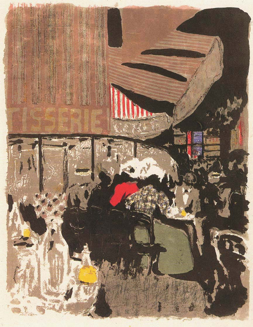 La Patisserie aus: Album Paysages et Interieurs, 5-farbige Lithografie